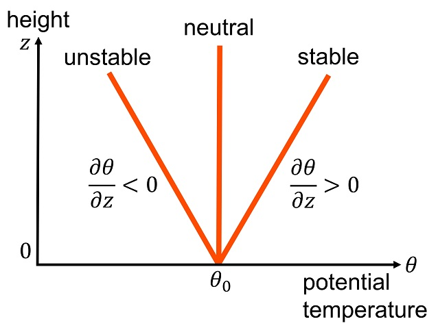 温位と大気の静的安定性を示す図。大気が安定なときは高度上昇とともに温位も上昇する。大気が中立なときは温位は高度によらず一定である。大気が不安定なときは高度上昇に伴い温位は低下する。